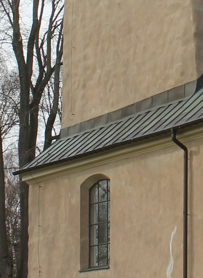 "Höftpartiet" mellan tornet och långhuset i Brännkyrka kyrka i stadsdelen Örby slott, Stockholm.